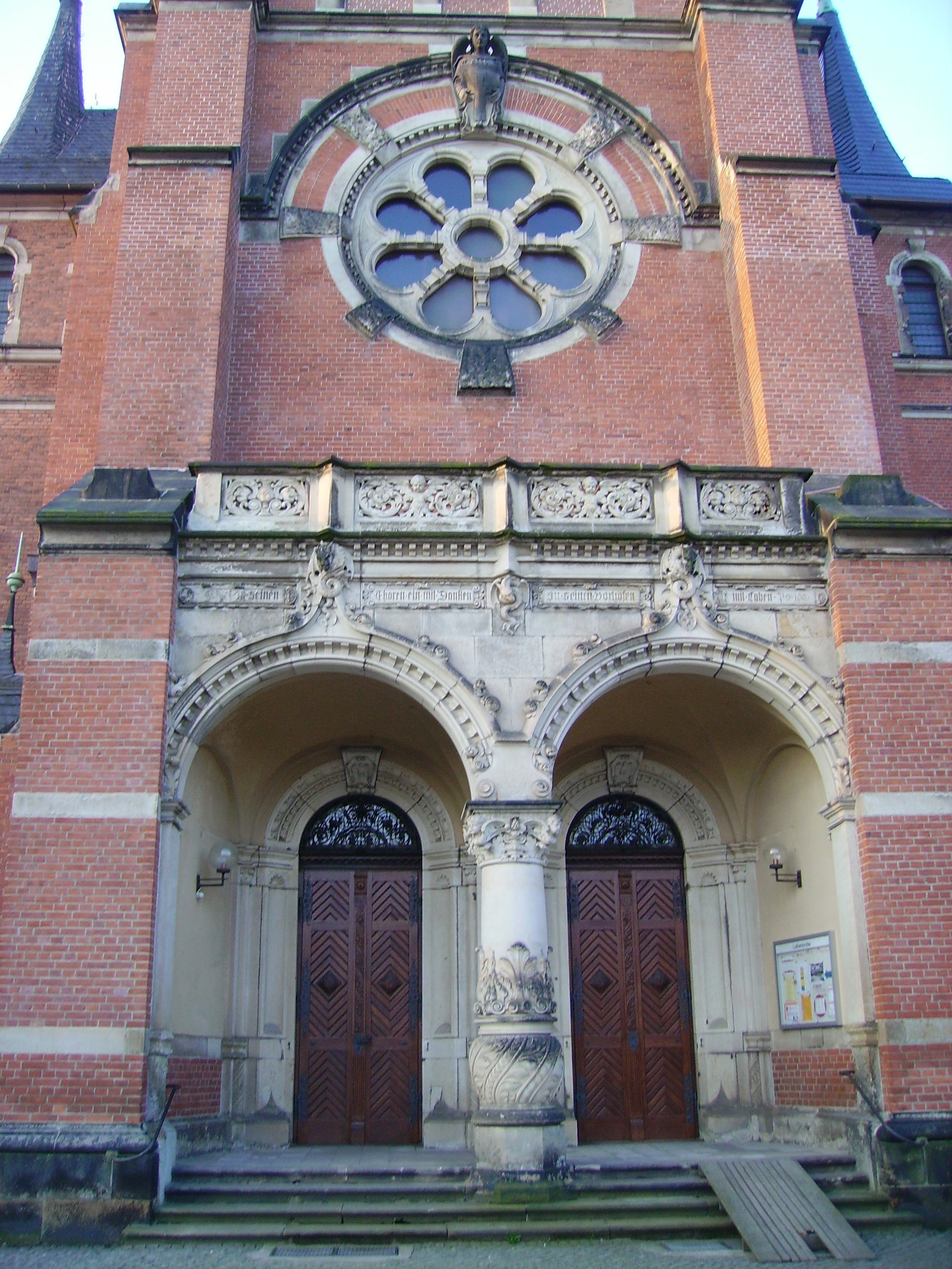 Radebeul (Dresden, Germany)